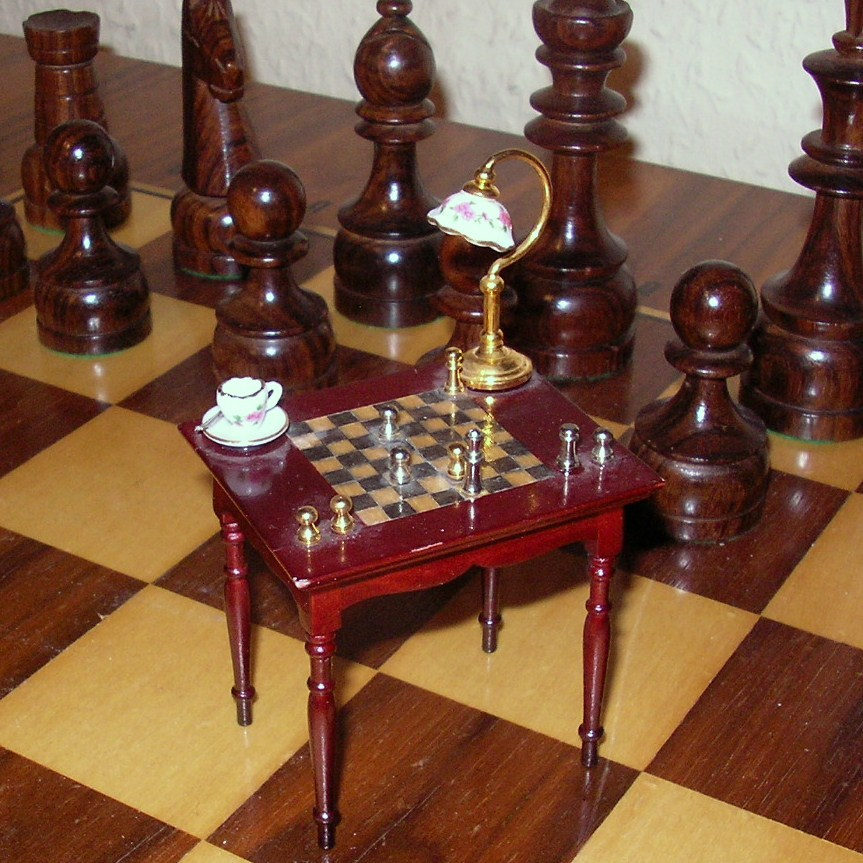 Miniatur-Biedermeier-Schachtisch, im Vergleich zu normalen Schachfiguren auf Holzbrett.